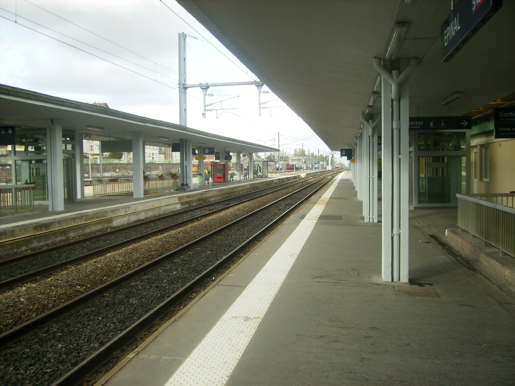 Gare d'épinal, direction Nancy